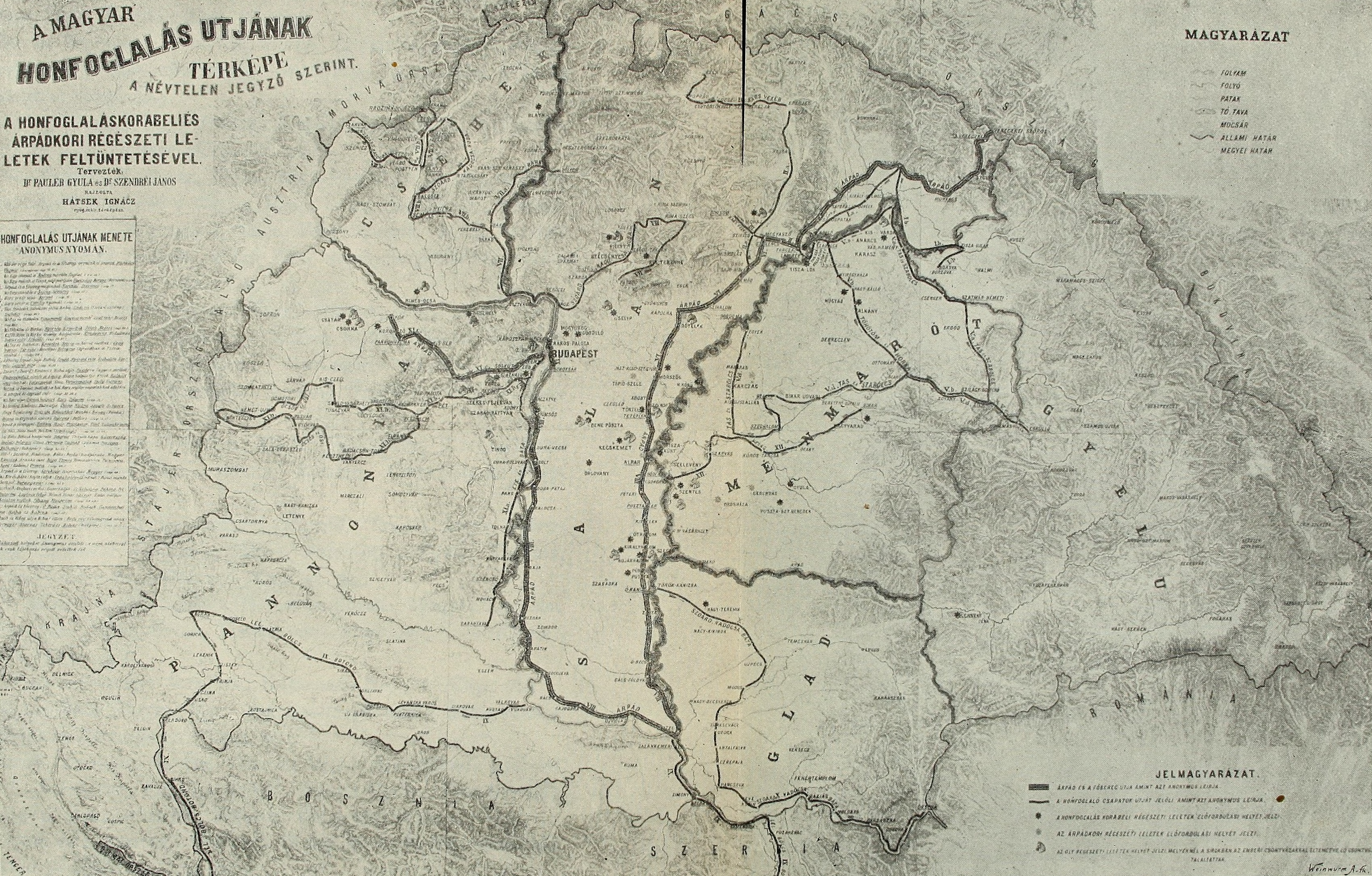 A magyar honfoglalás útjának térképe, a névtelen jegyző nyomán. A honfoglaláskorabeli és Árpádkori régészeti leletek feltüntetésével. Az 1896 évi ezredéves kiállításra tervezte: Dr. Pauler Gyula és Dr. Szendrei János. Rajzolta Hátsek Ignácz hossza 2 m és 2 cm szélessége 1 m és 29 cm.